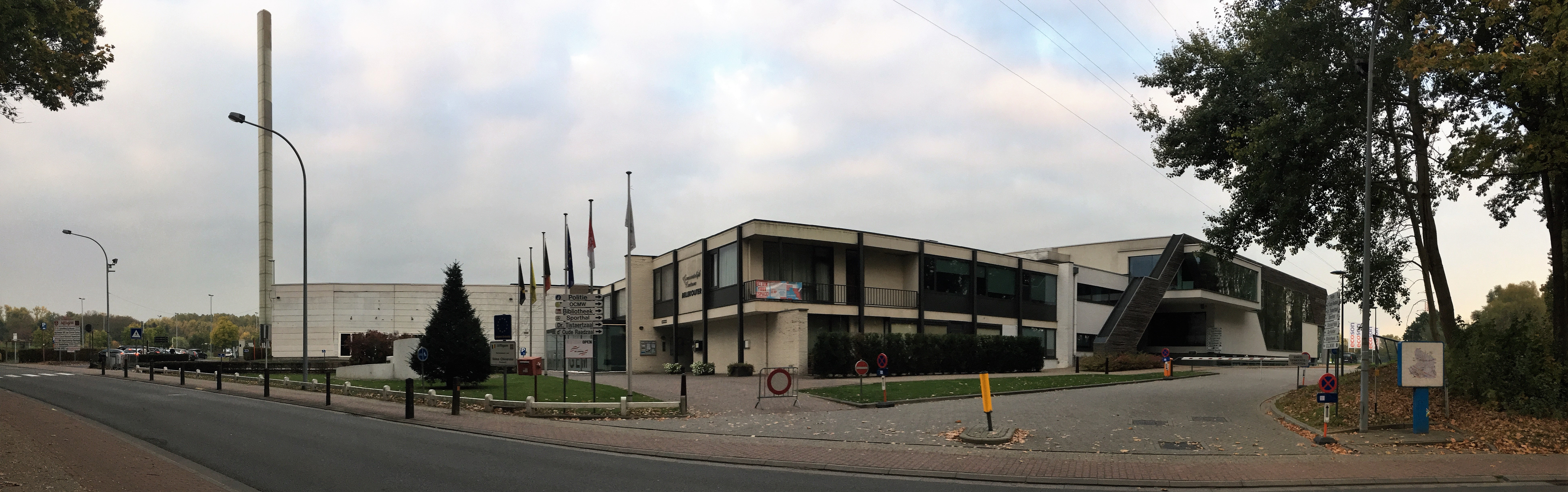 Panoramisch beeld van het Bellekoutercomplex in Affligem